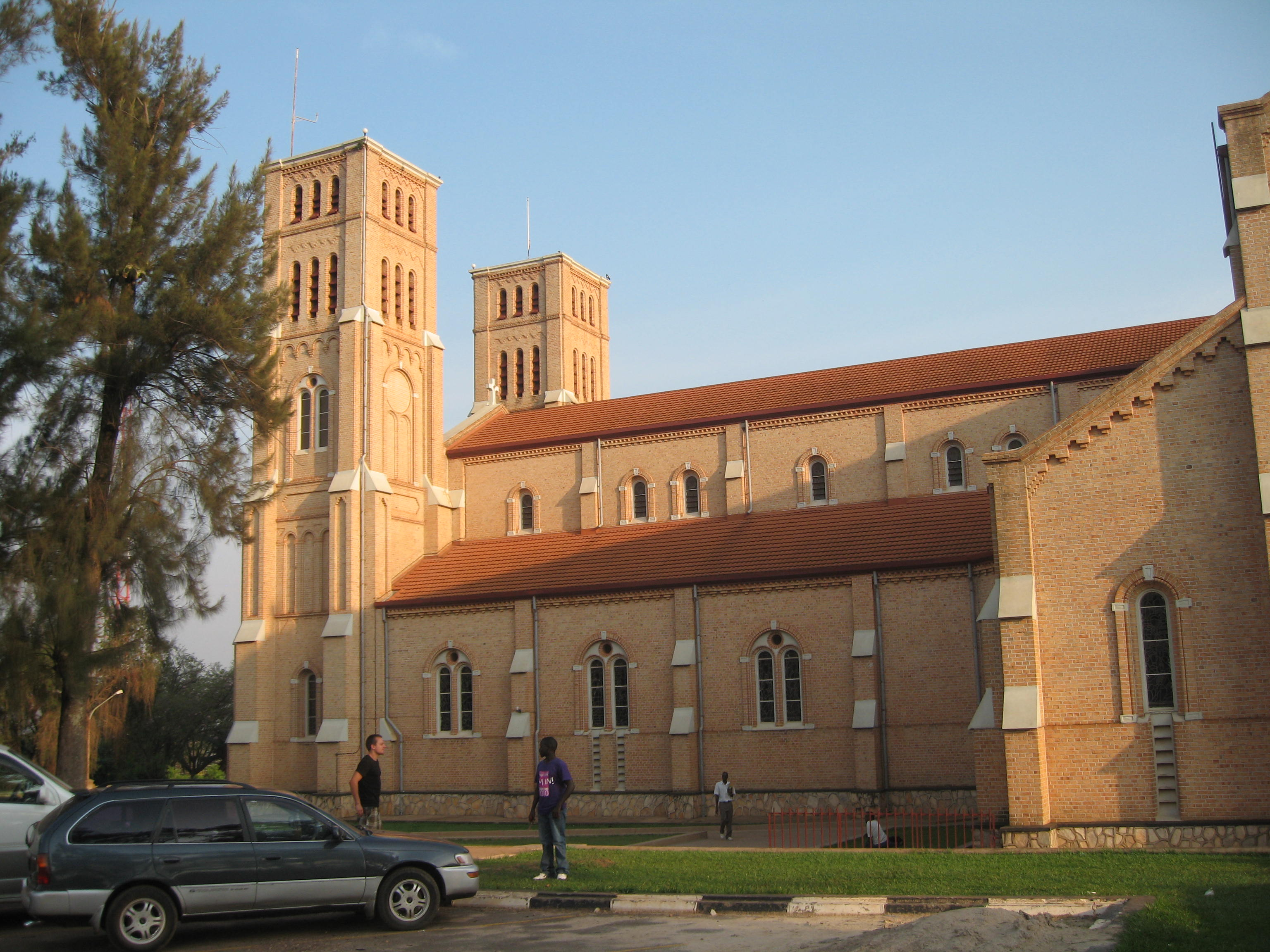 Kath. Katedrale von Kampala, Uganda